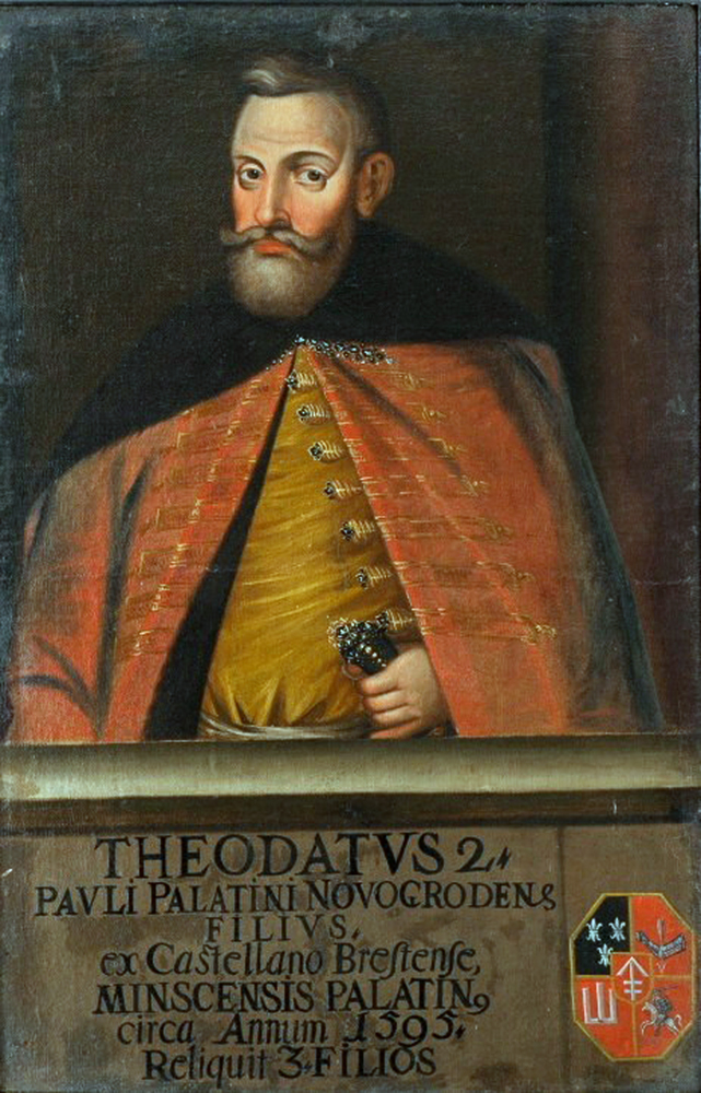 Беларуская (тарашкевіца): Партрэт Багдана Сапегі (Bahdan Sapieha) гербу «Ліс» (каля 1530 — 1-я пал. 1593), дзяржаўнага дзеяча Вялікага Княства Літоўскага, ваяводы менскага.